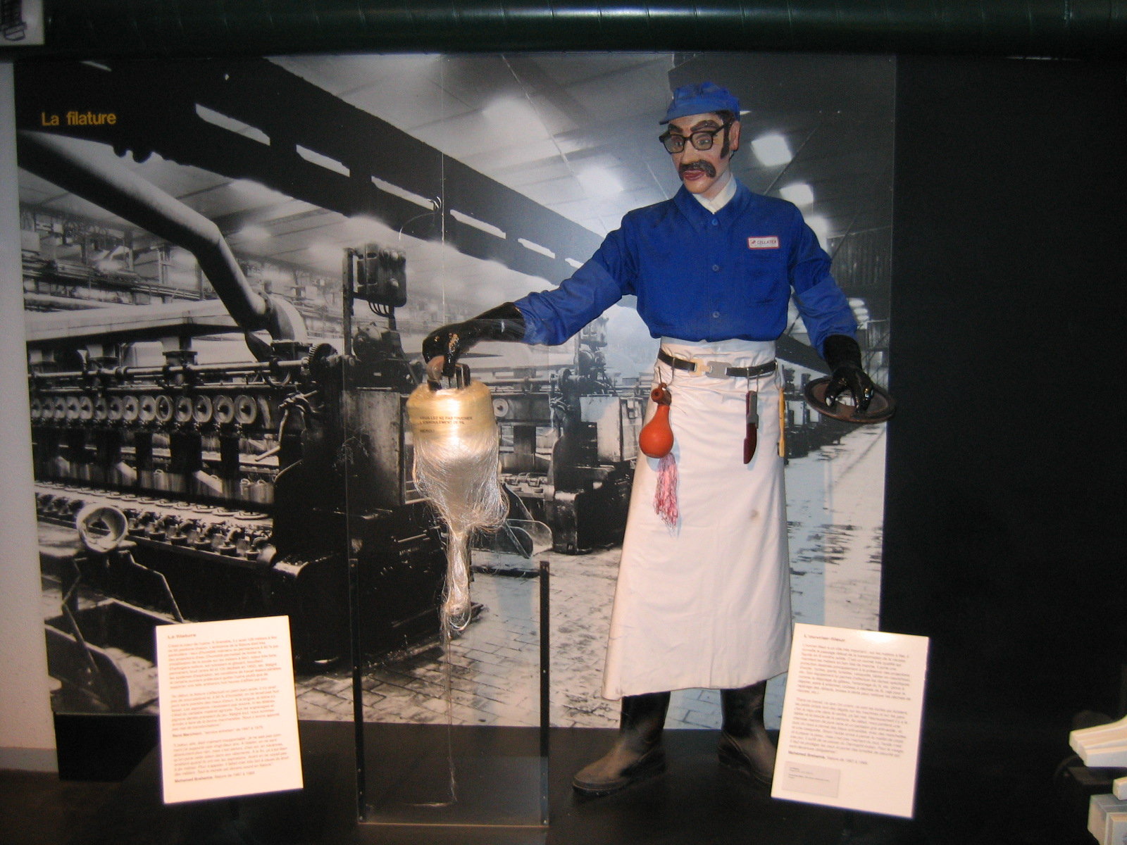 photo prise au musée de la viscose